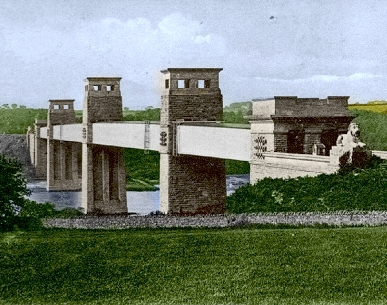 Die alte Britanniabruecke auf einer Postkarte aus der Privatsammlung von Jochem Hollestelle